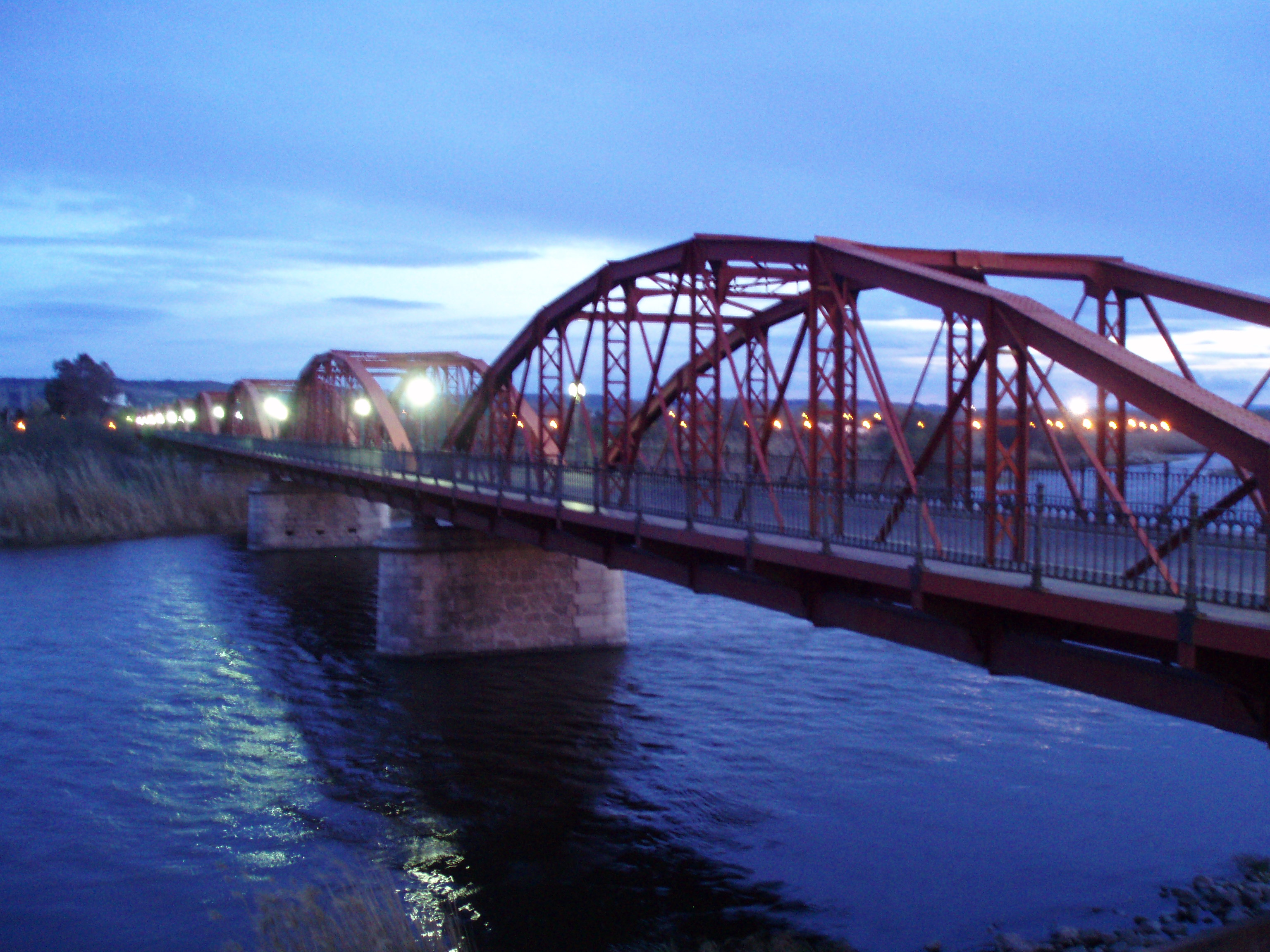 Puente de Hierro - Talavera